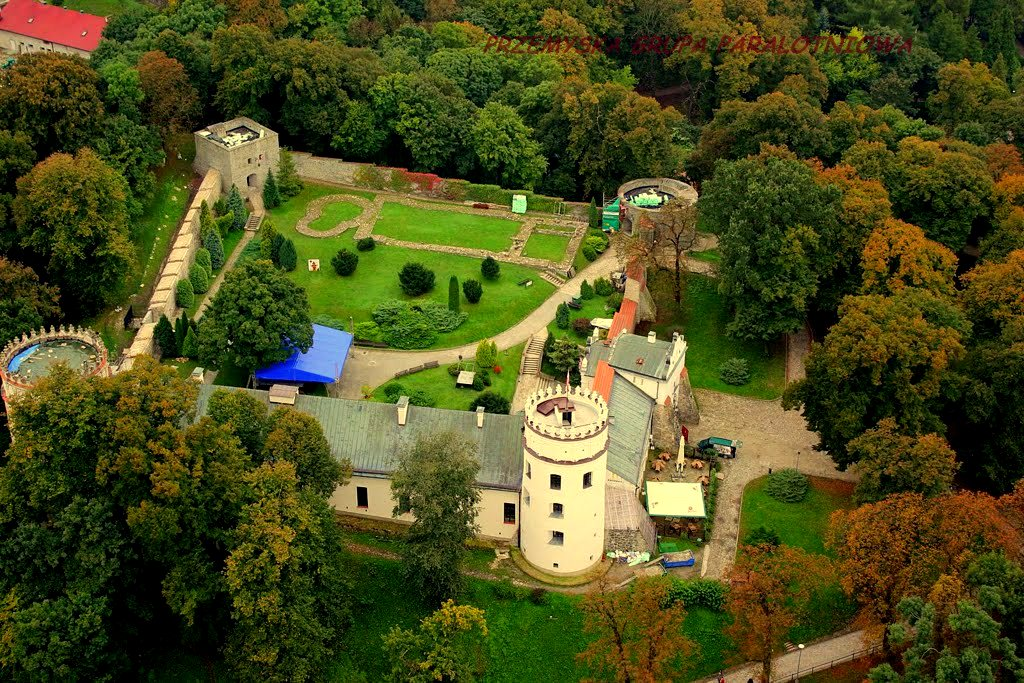 Podkarpacie, Przemyśl, Zamek Kazimierzowski